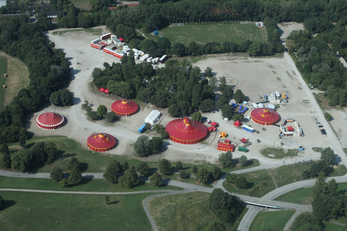 LILALU Sommer 2013 von oben, mehr dazu unter